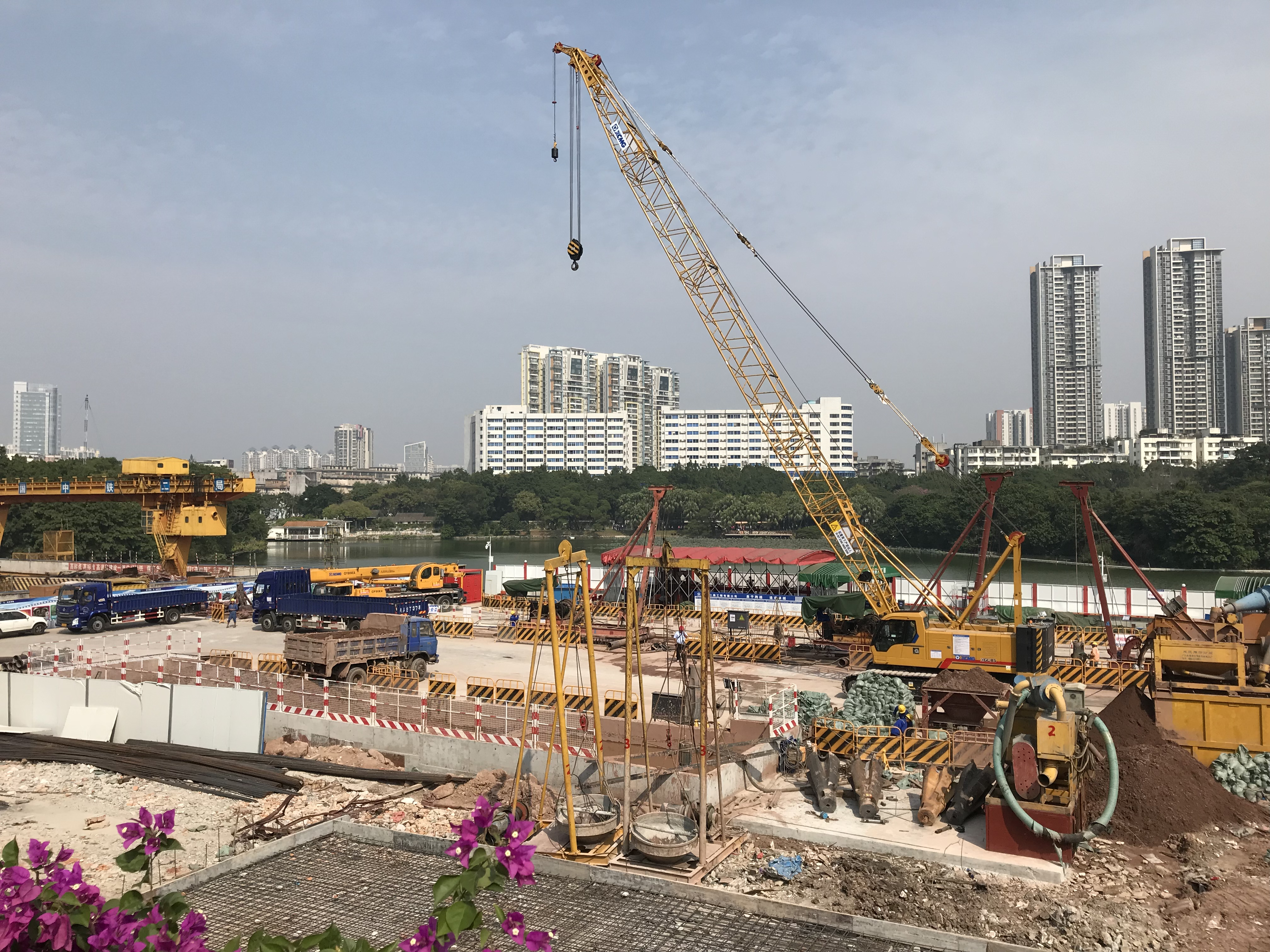 彩虹桥施工现场